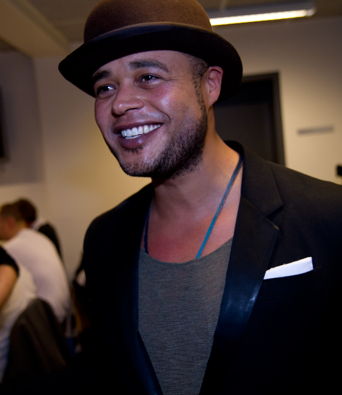 Remee, sangskriver for årets vinders af Dansk Melodi Grand Prix 2012.